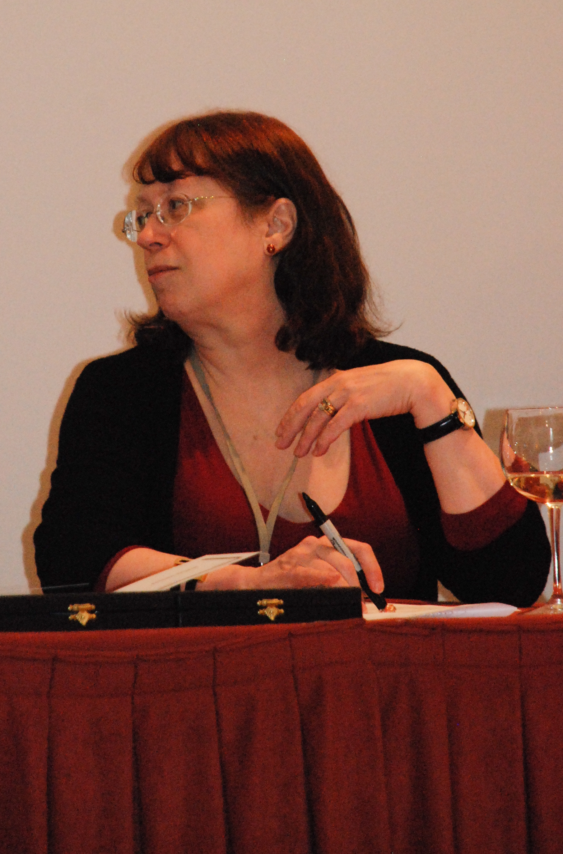 Diane Duane, Deepcon 11, 2010.